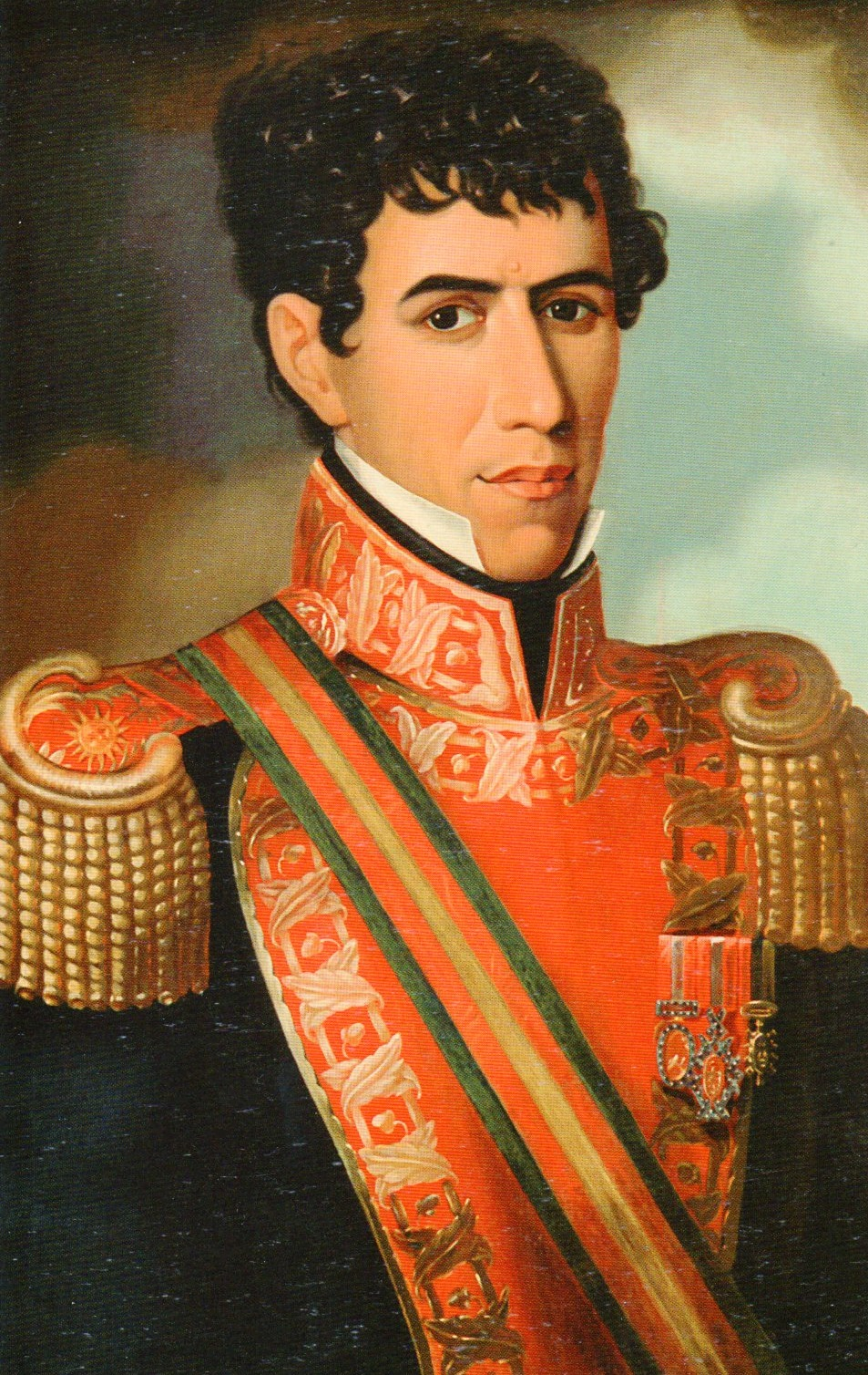 Andrés Santa Cruz Calahumana, Presidente de Bolivia y del Perú, y Supremo Protector de la Confederación Perú-Boliviana